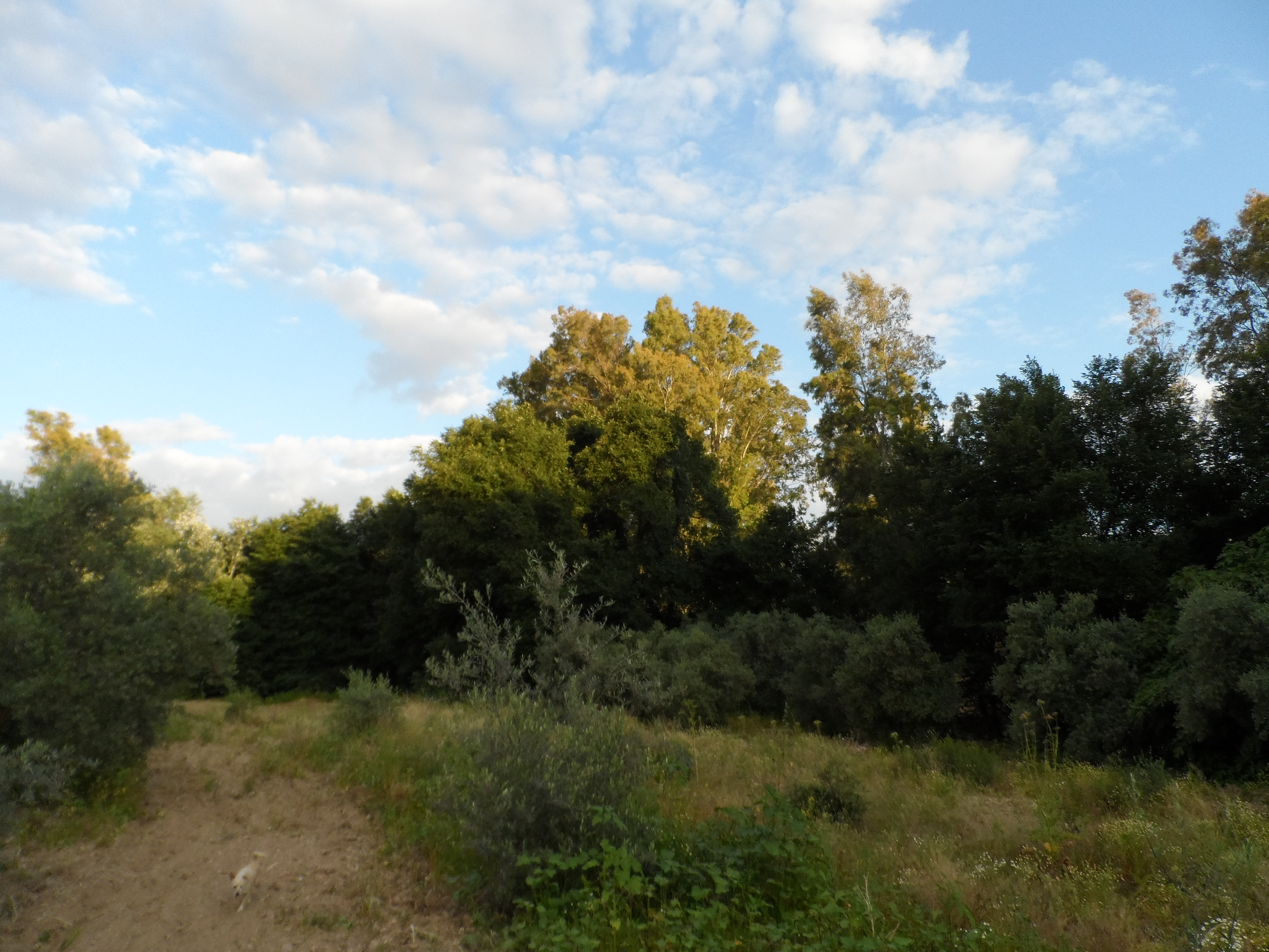 Campo de álamos en la ribera del arroyo guadalmazán